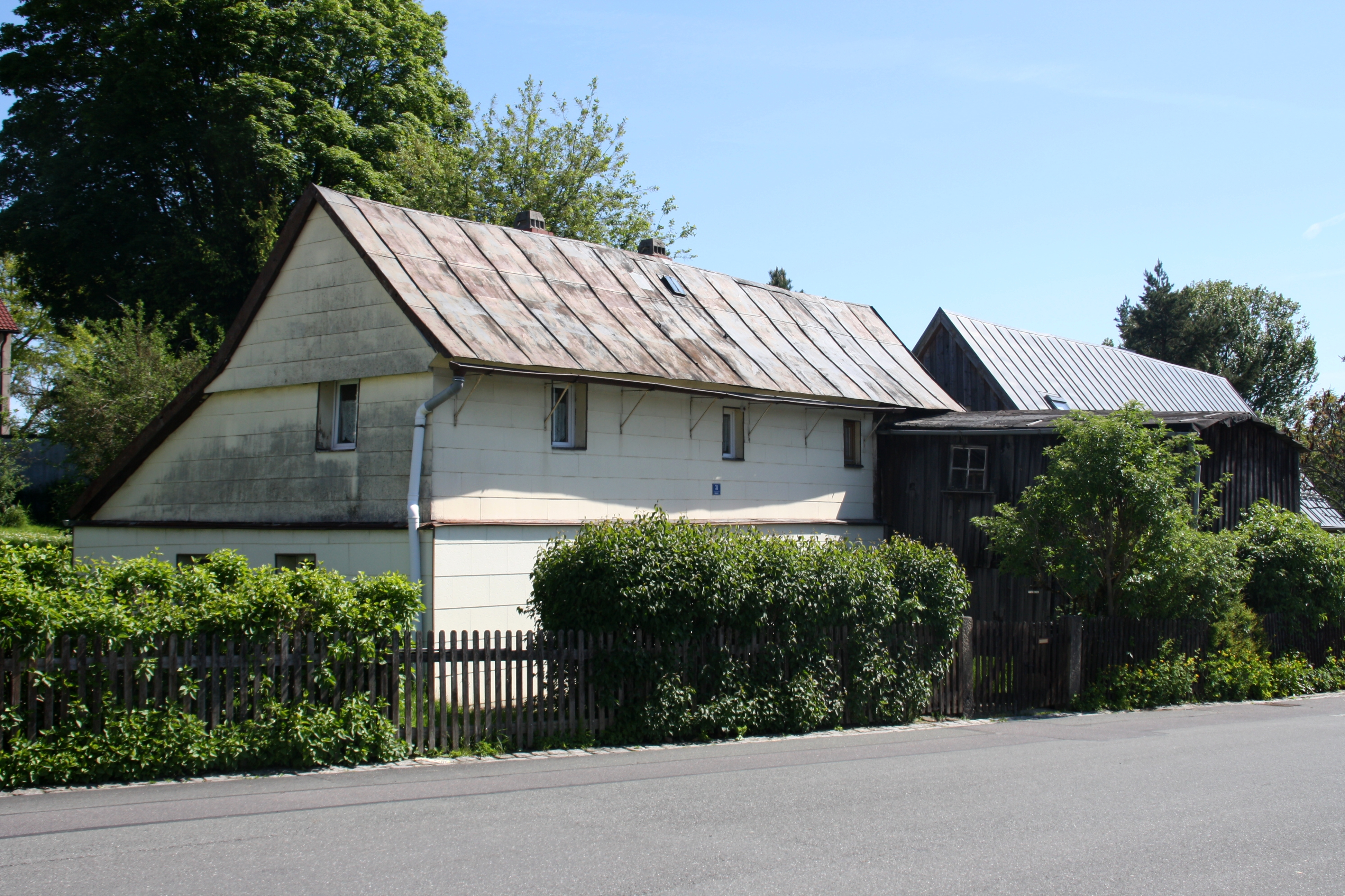 Frackdachhaus in der Bahnhofstraße 31, Schönwald; Hofseitiges Obergeschoss in Fachwerk; aus dem frühen 19. Jahrhundert